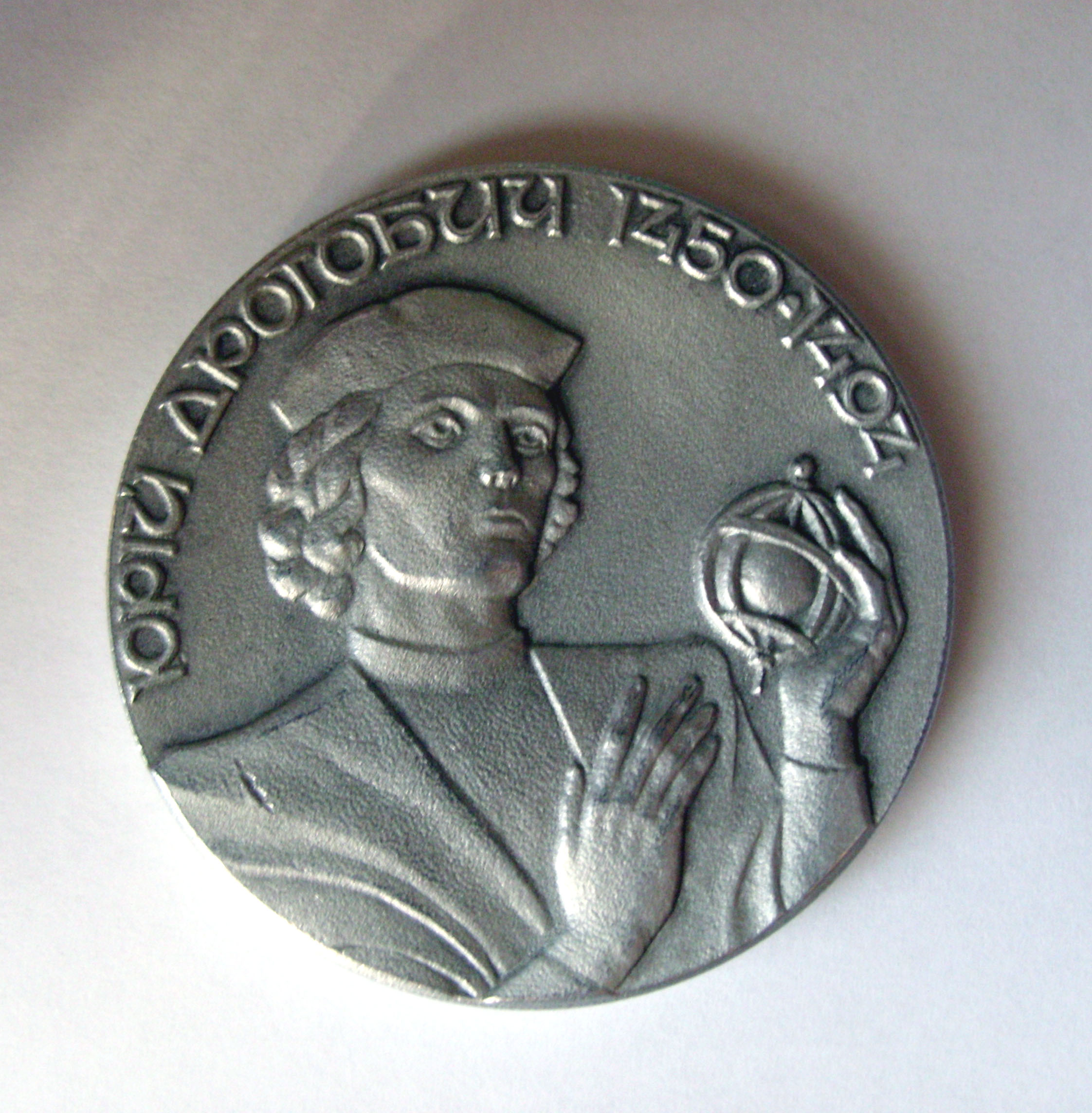 памятна медаль Ю.Дрогобича